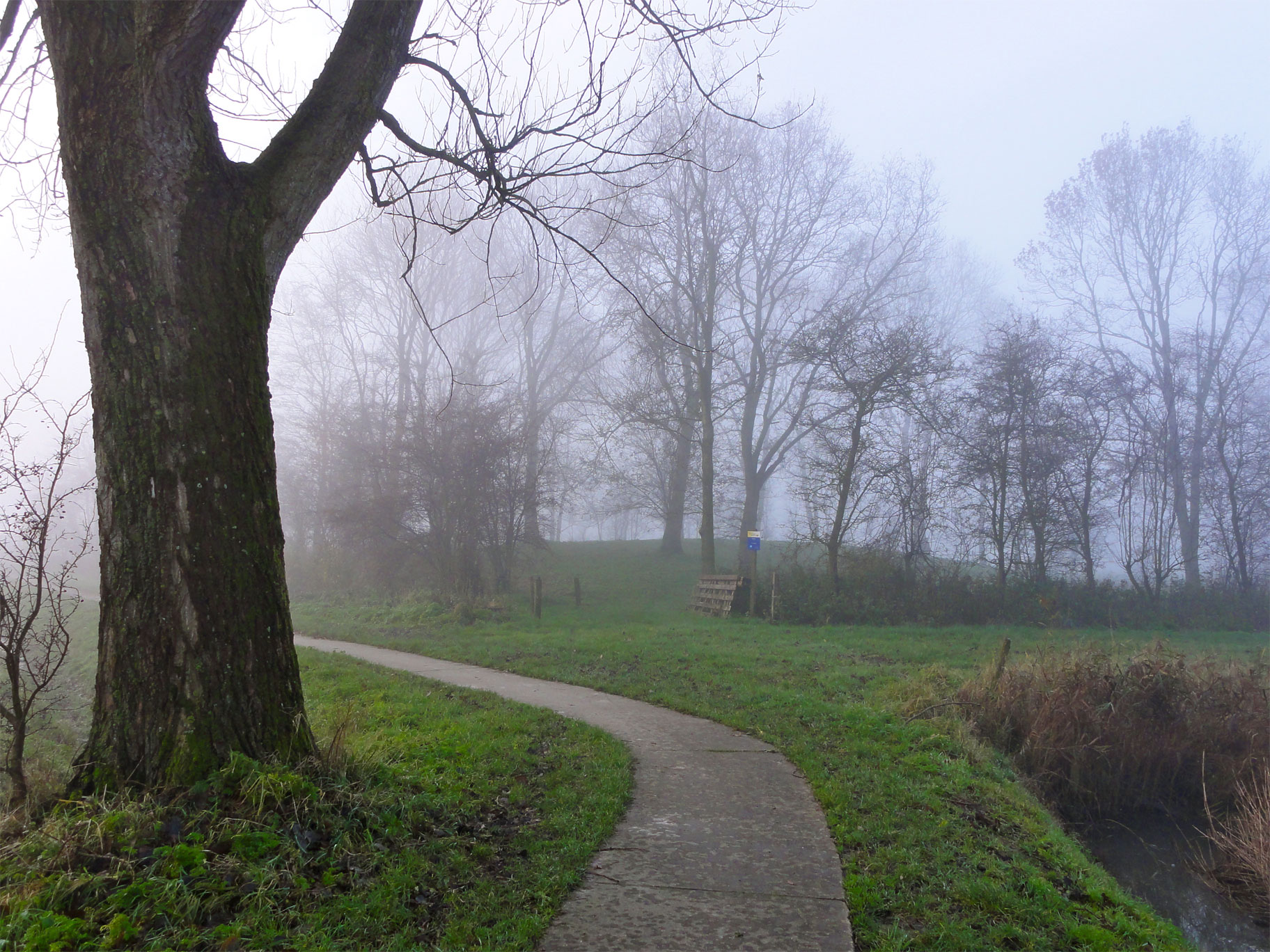 Ol Weem terpenkerkhof van het voormalige Vliedorp, nabij Houwerzijl